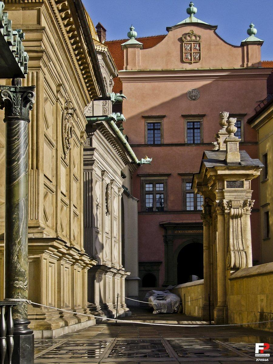 Nietypowe ujęcie kaplic Wazów i Zygmuntowskiej "z profilu". Widok w stronę Bramy Berrecciego.